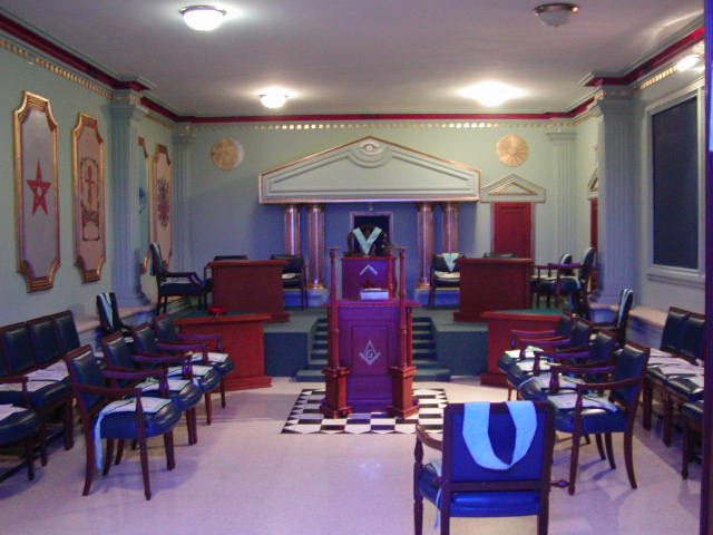 Interior del templo romano